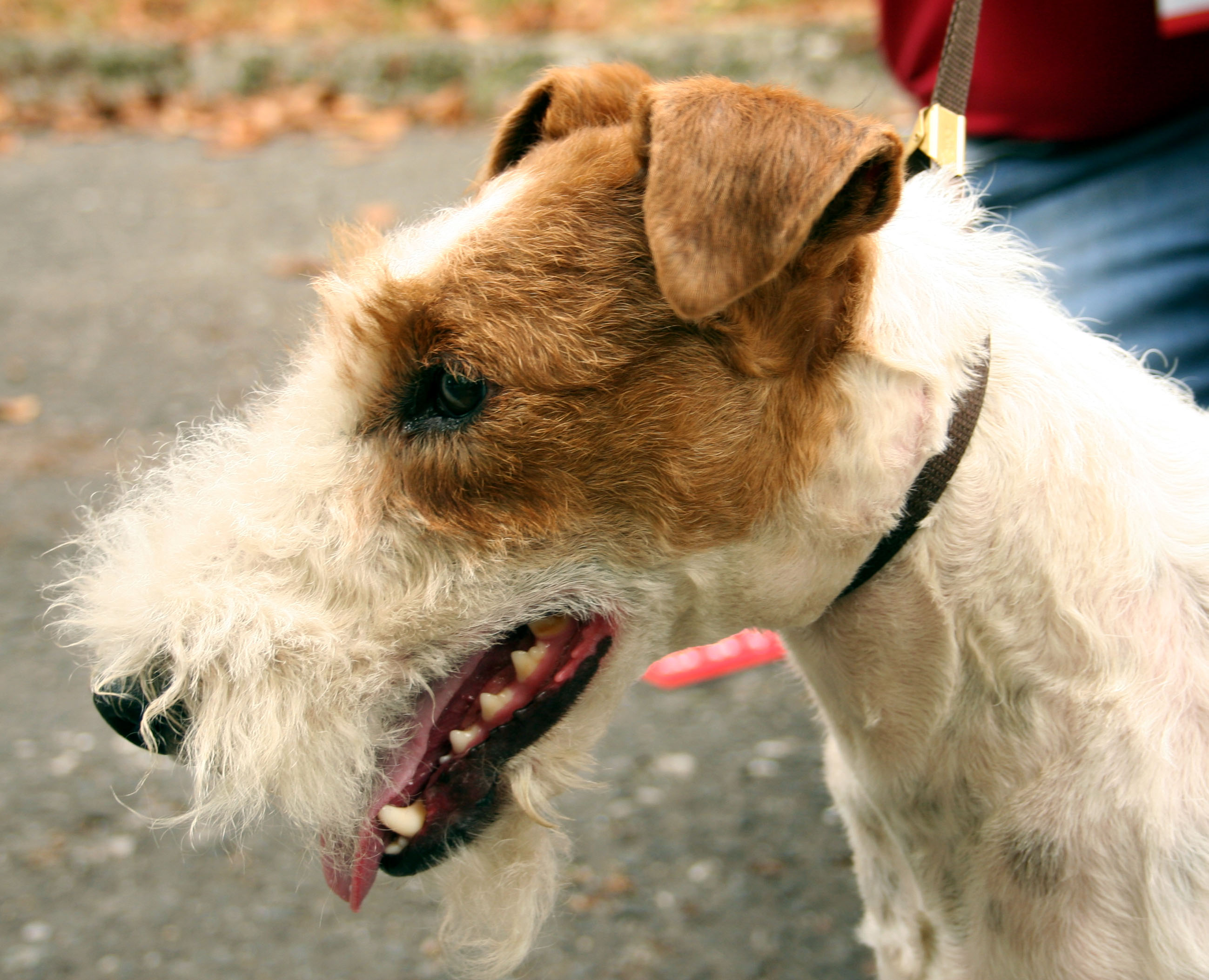 Foksterier_szorstkowlosy na krajowej wystawie w Rybniku - Kamieniu